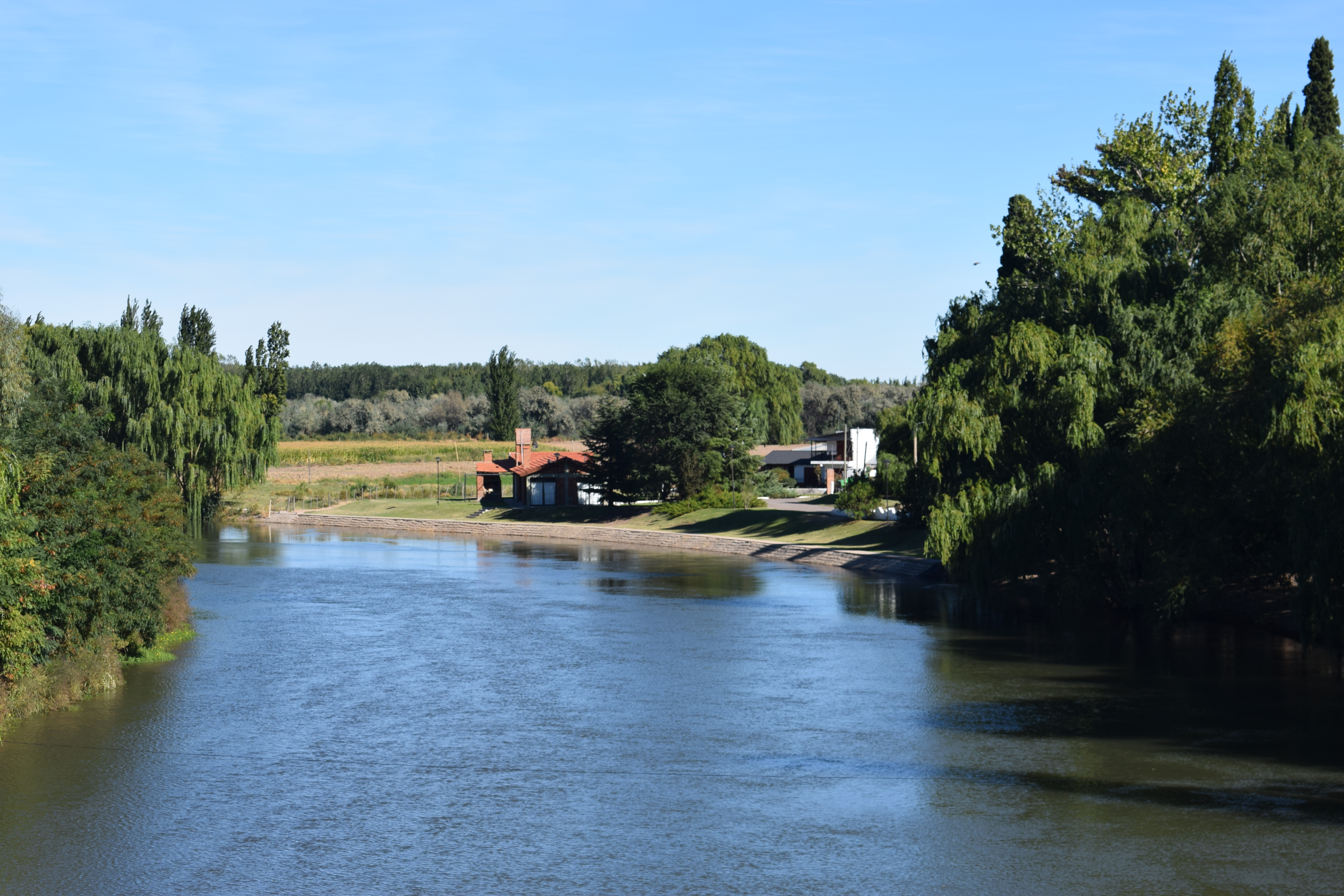 Vista del Brazo Sur del Rio Negro, que forma la costa de la localidad de Pomona